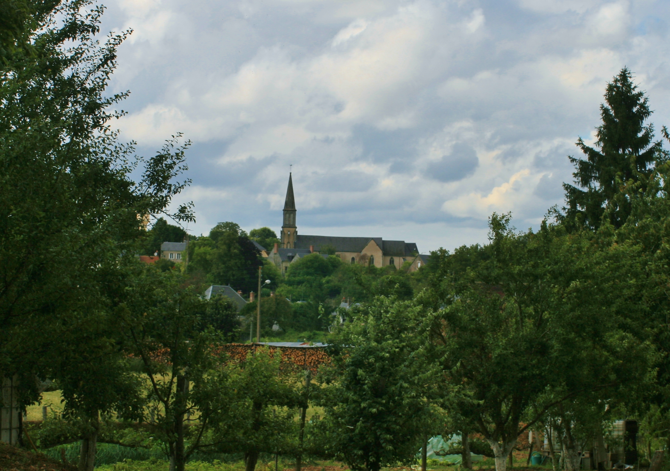 Une autre vue sur l´eglise de Houssay